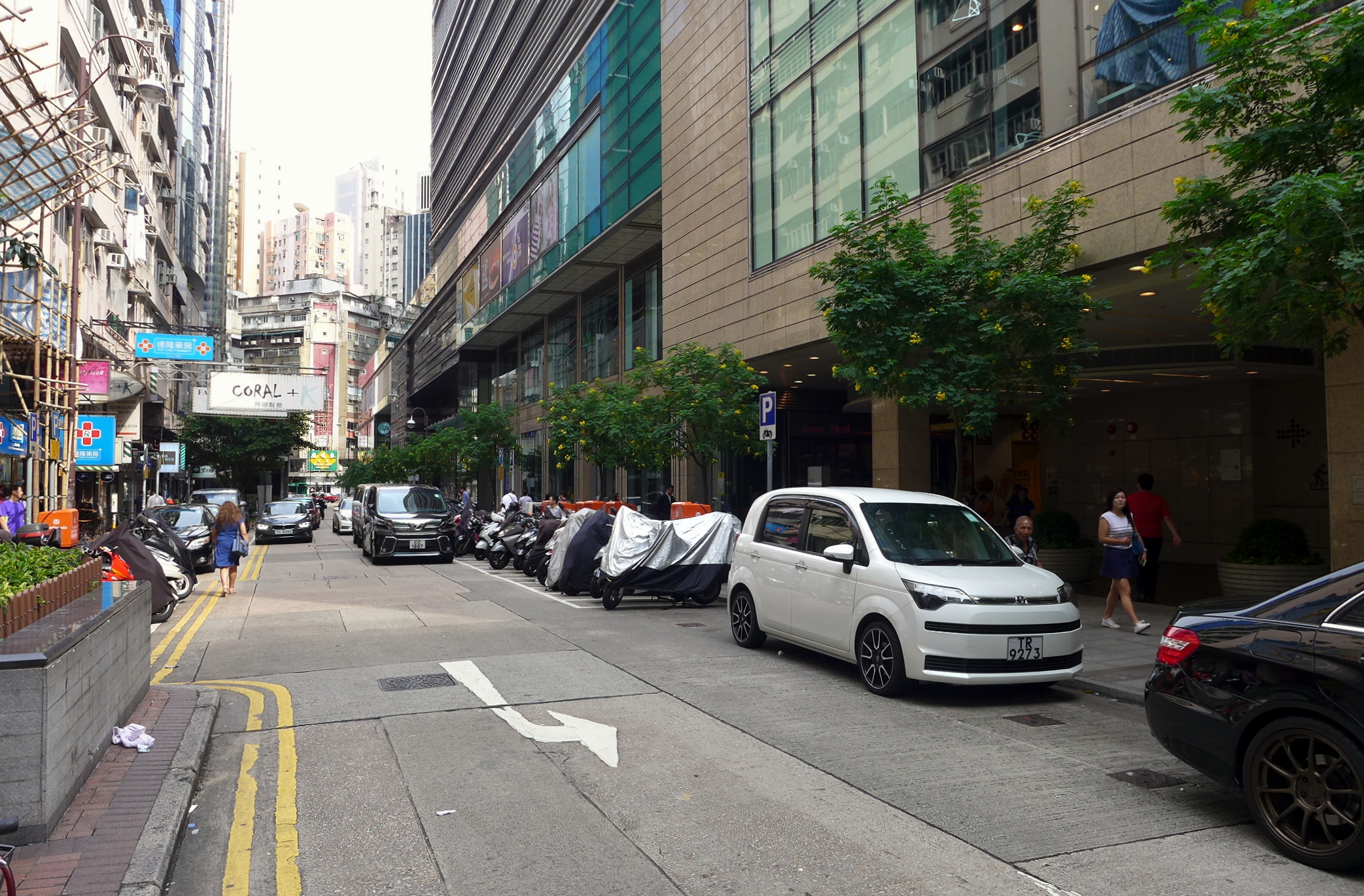 Hanoi Road